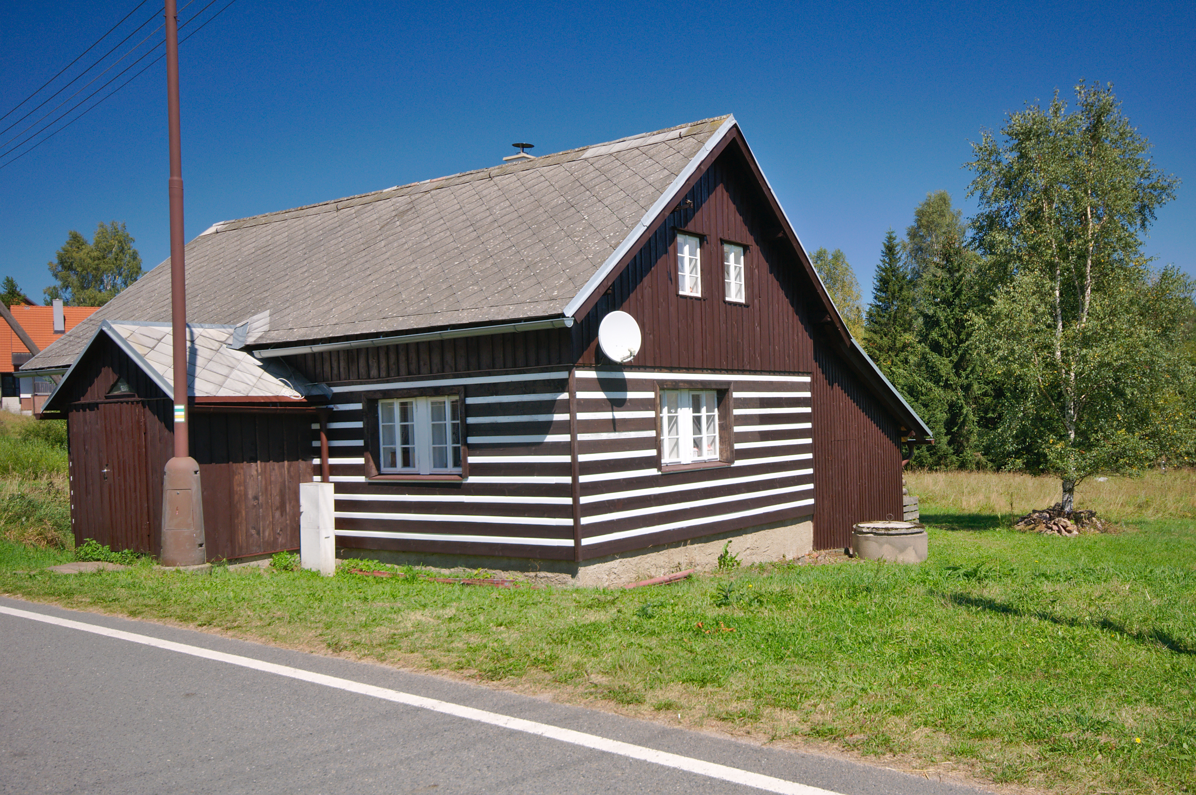 Starý dům, Orlické Záhoří, okres Rychnov nad Kněžnou